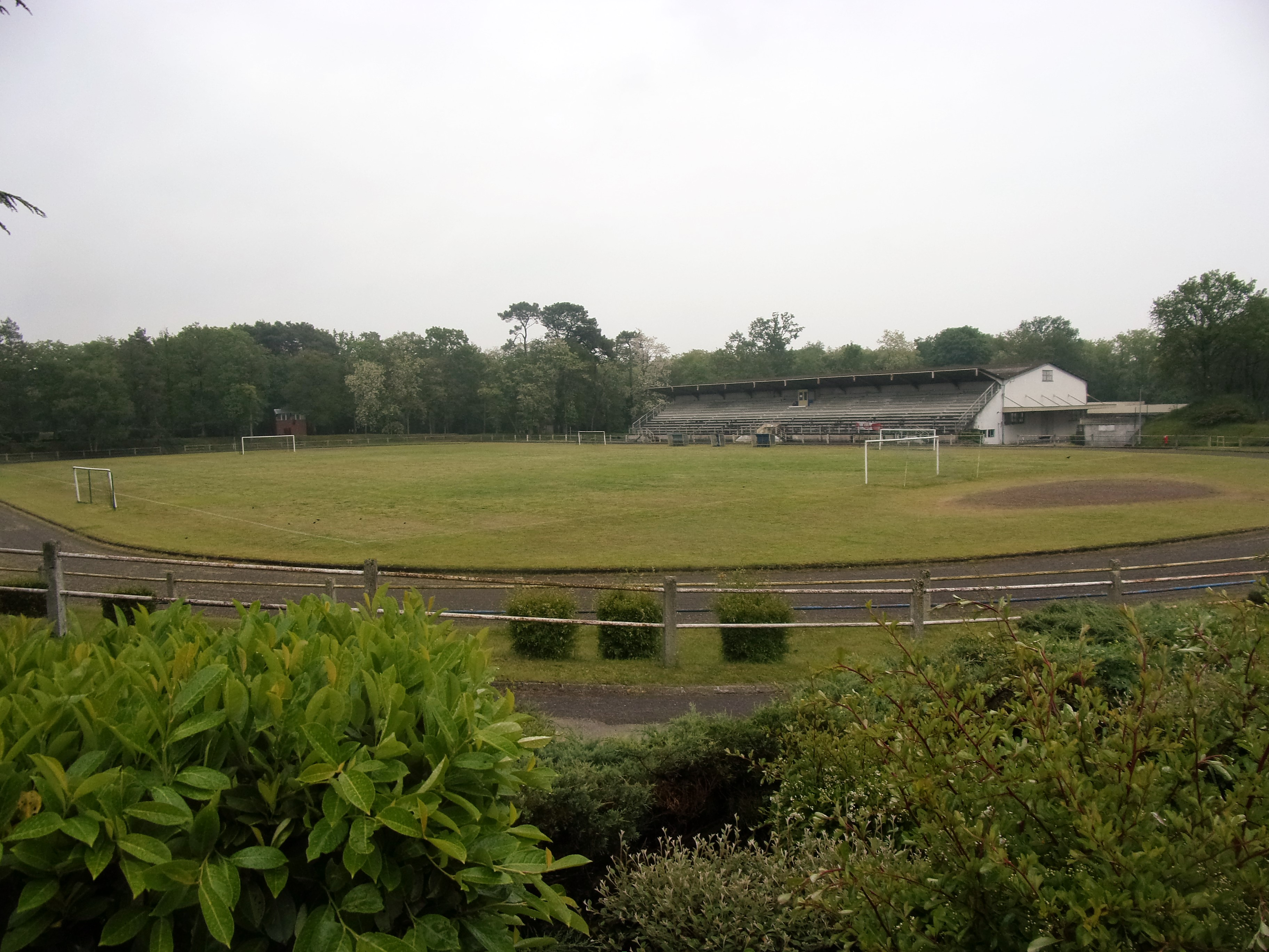 Le terrain de sports du complexe sportif de Vaugourdon, à Veigné